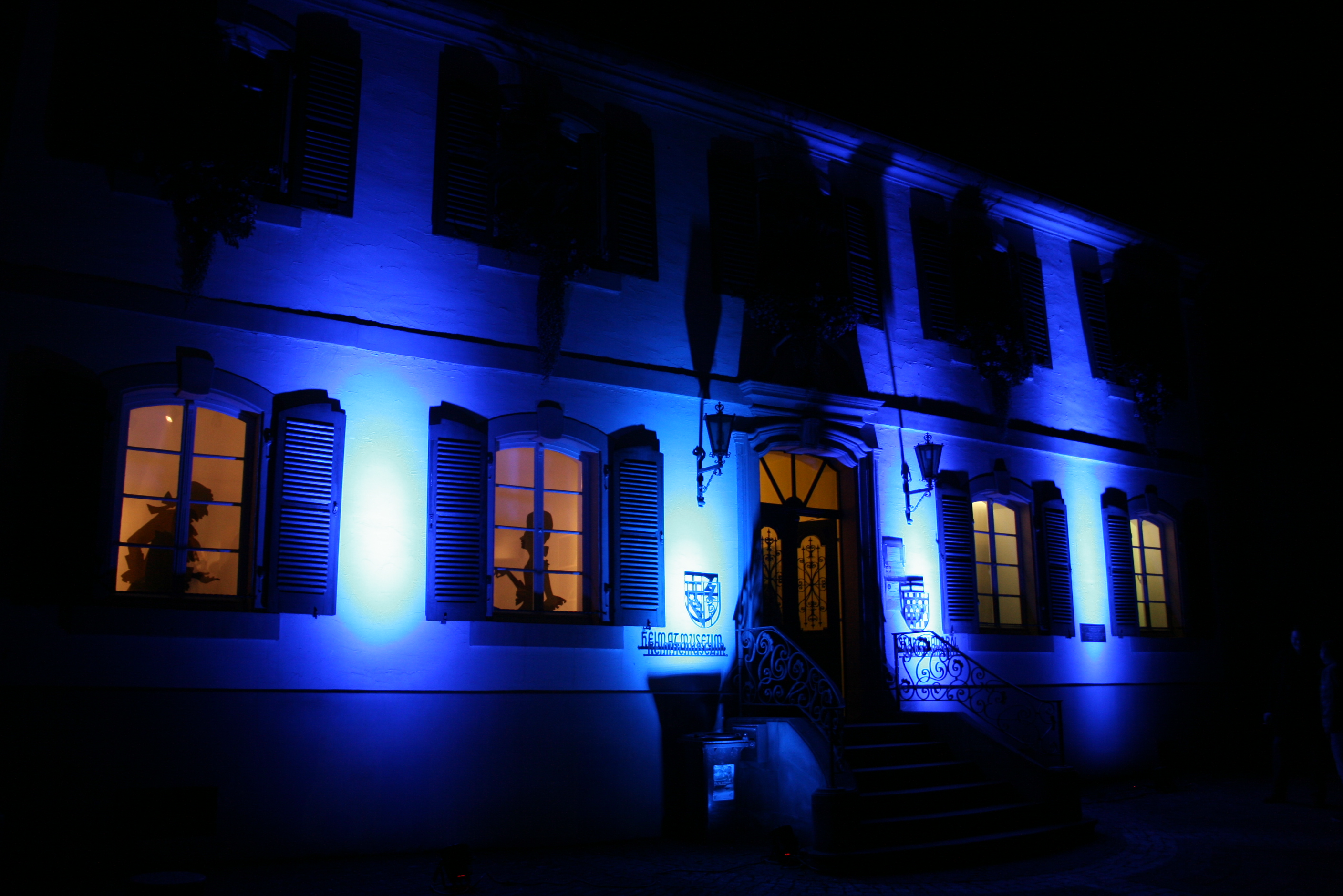 ZU sehen ist das Museum von außen. Es ist aufgrund der feierlichen Neueröffnung blau beleuchtet.